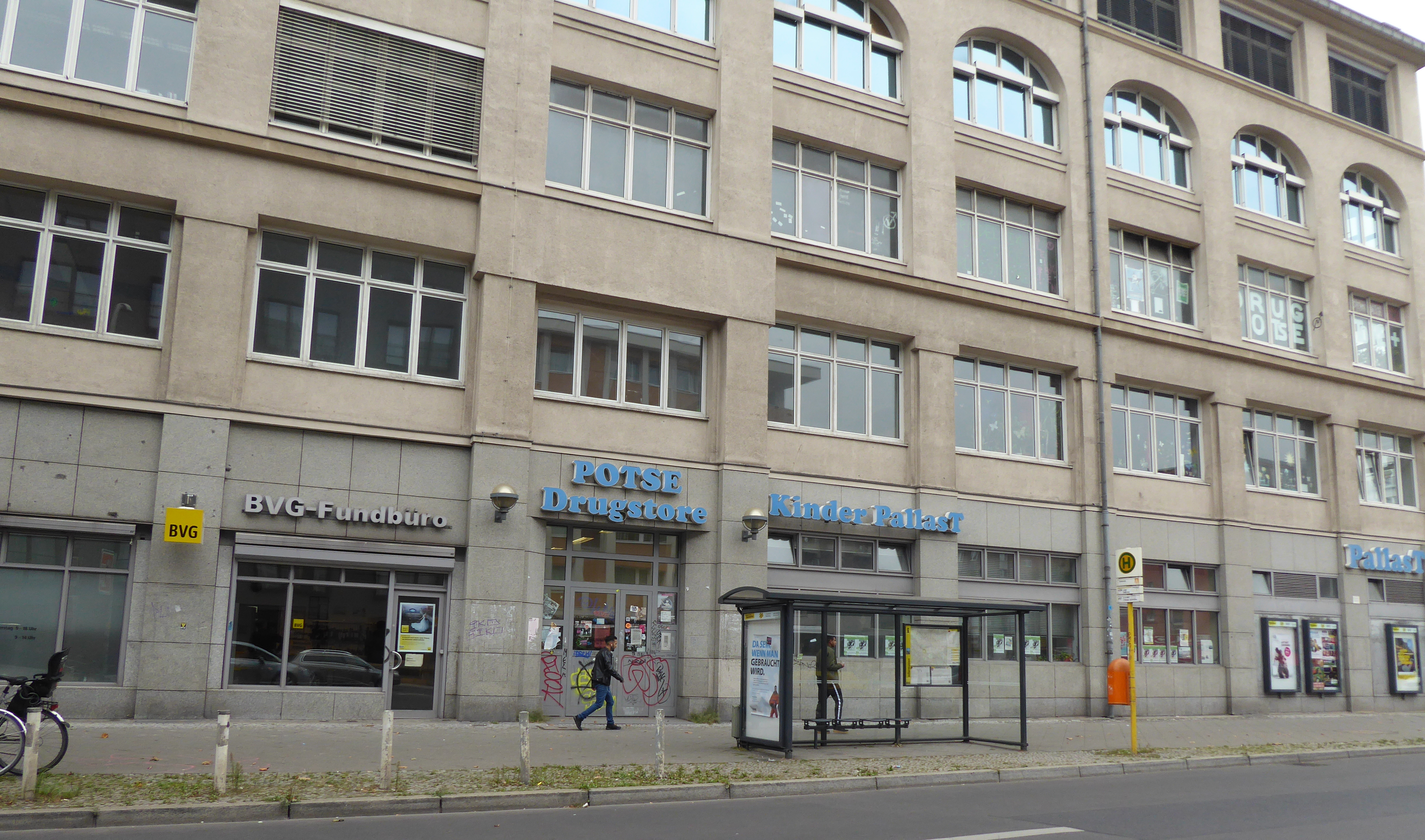 Schöneberg Potsdamer Straße Potse Drugstore